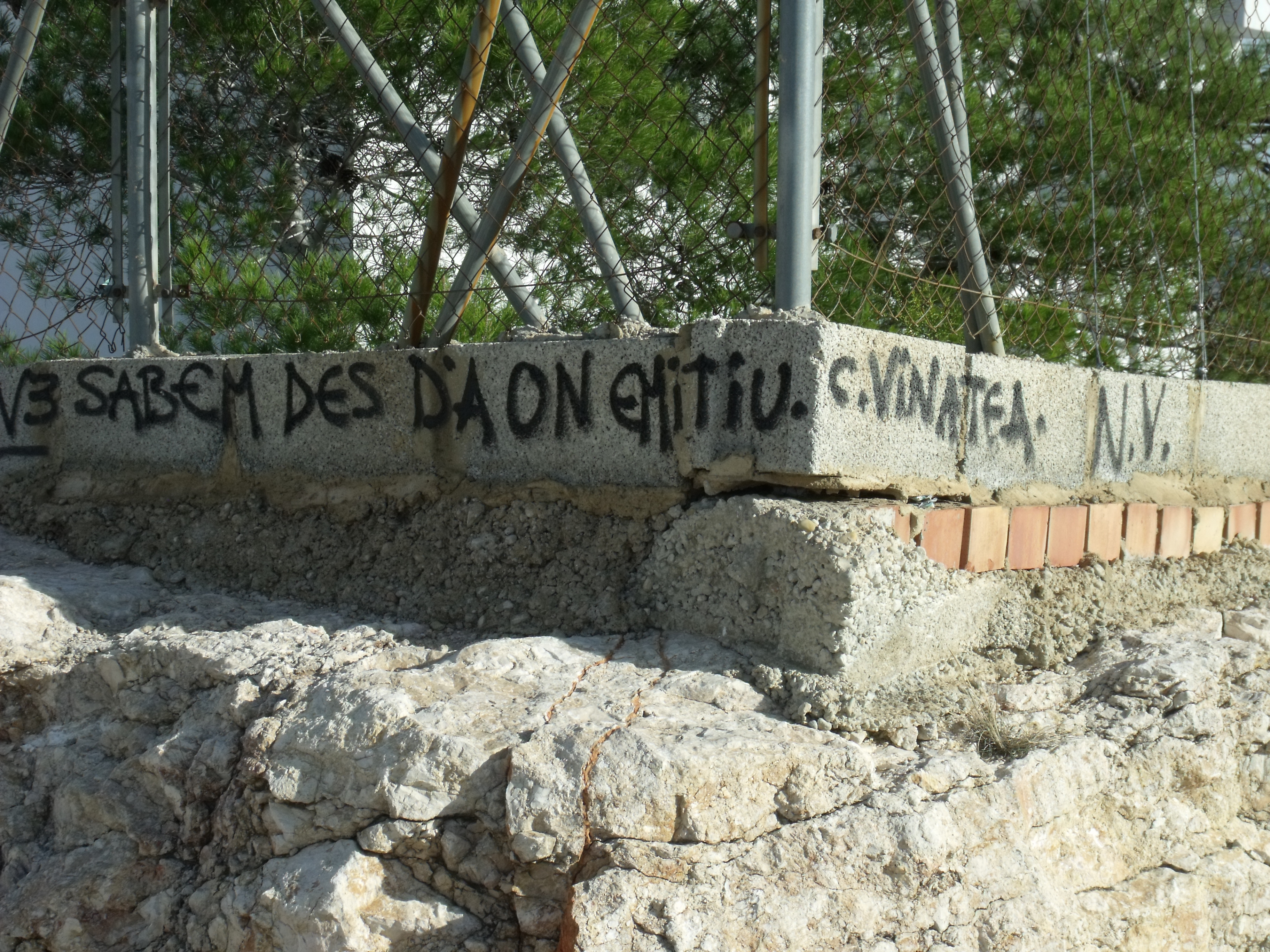 Pintada contra las emisiones de TV 3 en la Comunidad Valenciana. Está en la verja del repetidor que utilizaban en la Sierra Perenchiza.